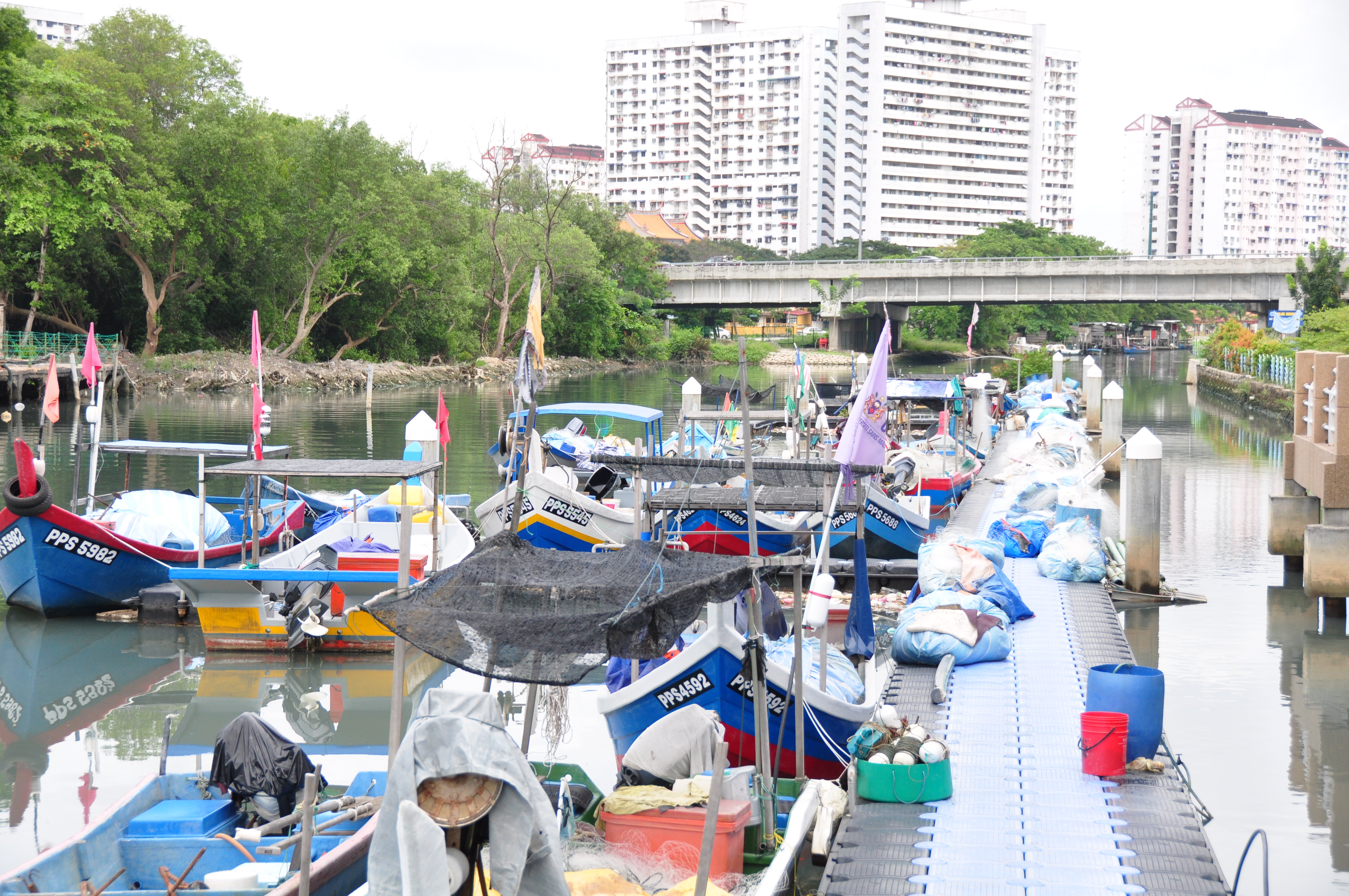 Sungai Pinang